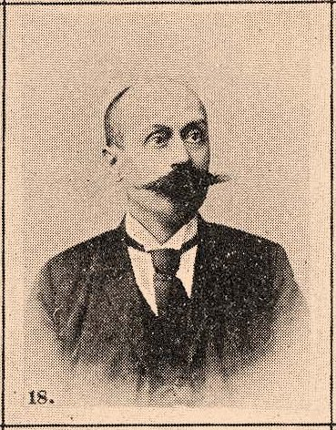 Karsa István, Abaúj-Torna vármegye II. aljegyzője